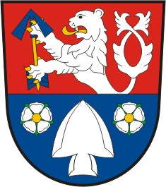 Melč znak